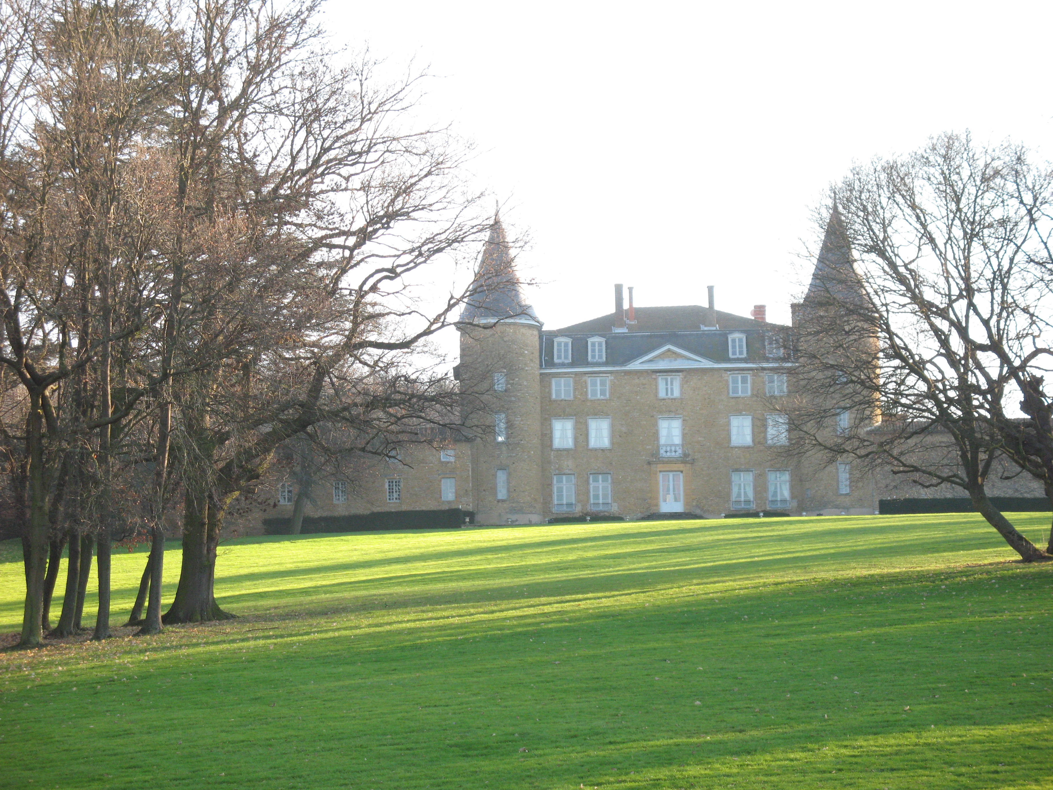 Château de Janzé à Marcilly-d'Azergues dans le Rhône